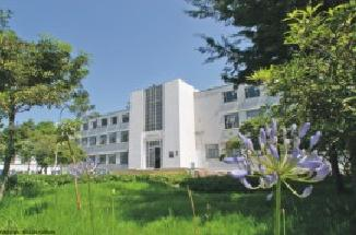 Facultad de Derecho y Ciencias Sociales